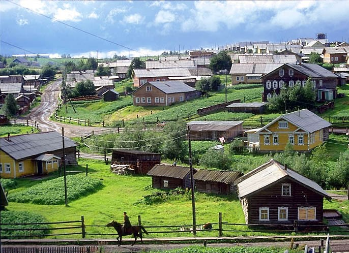 Просто село